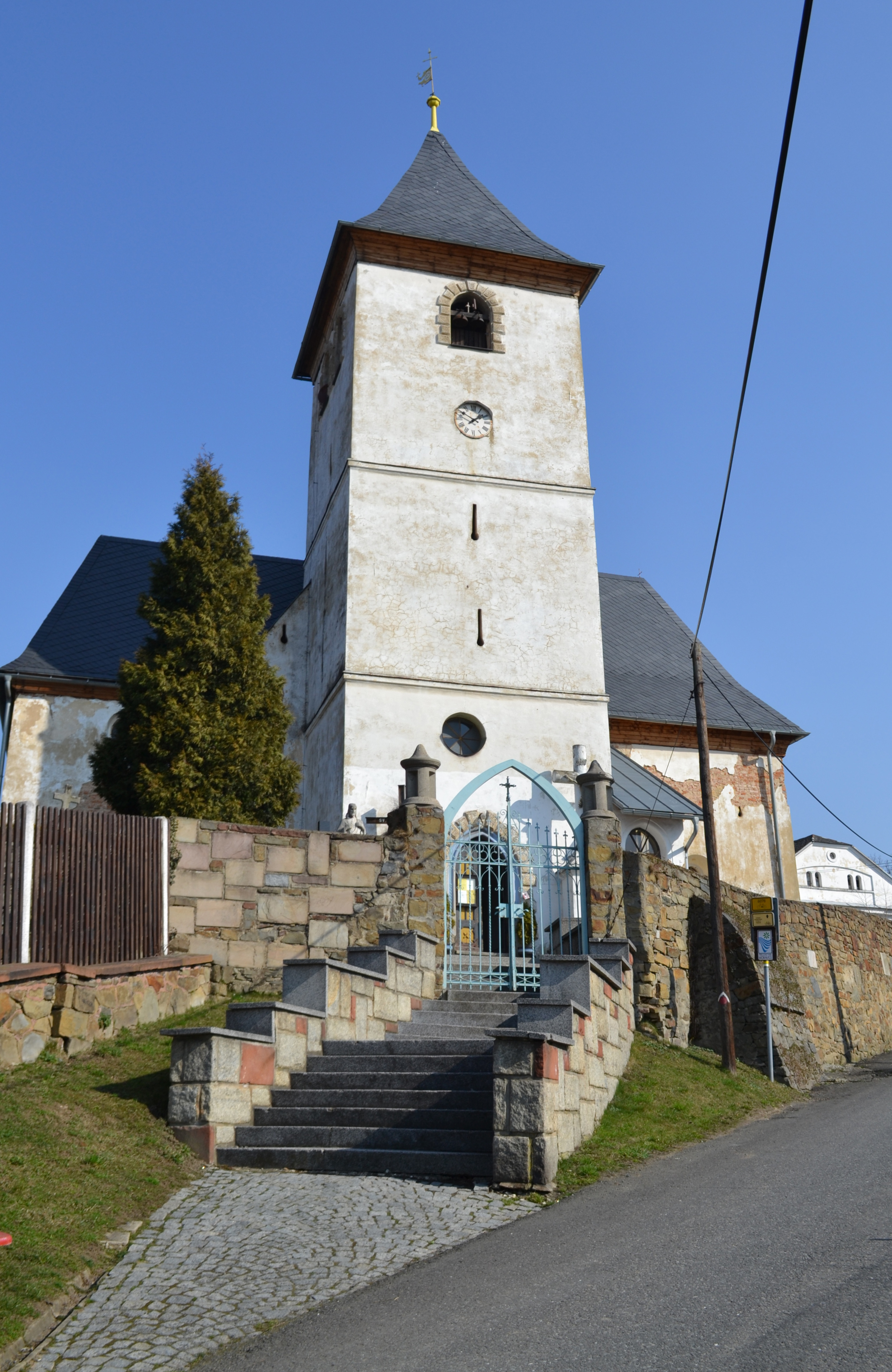 západní pohled na kostel Nejsvětější Trojice (Raduň, Moravskoslezský kraj, Česká republika)